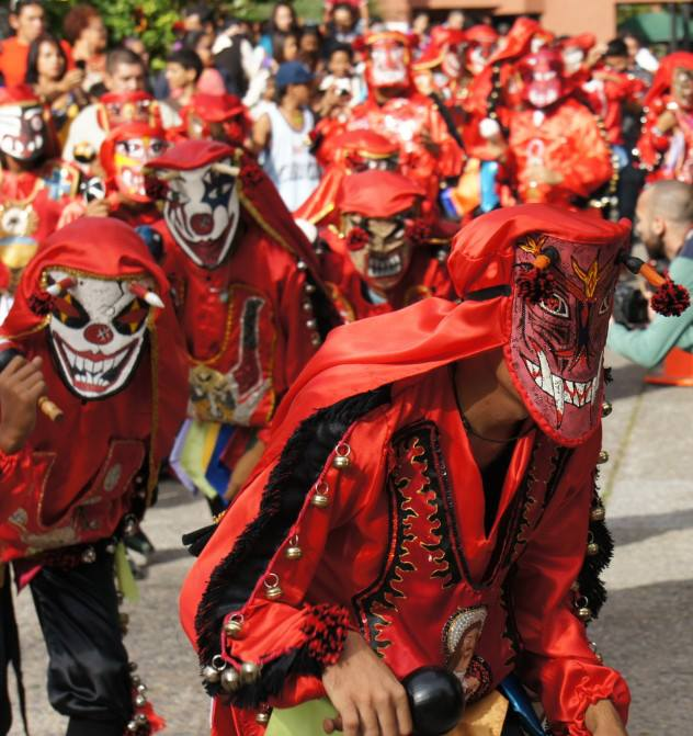 Diablitos de Tinaquillo